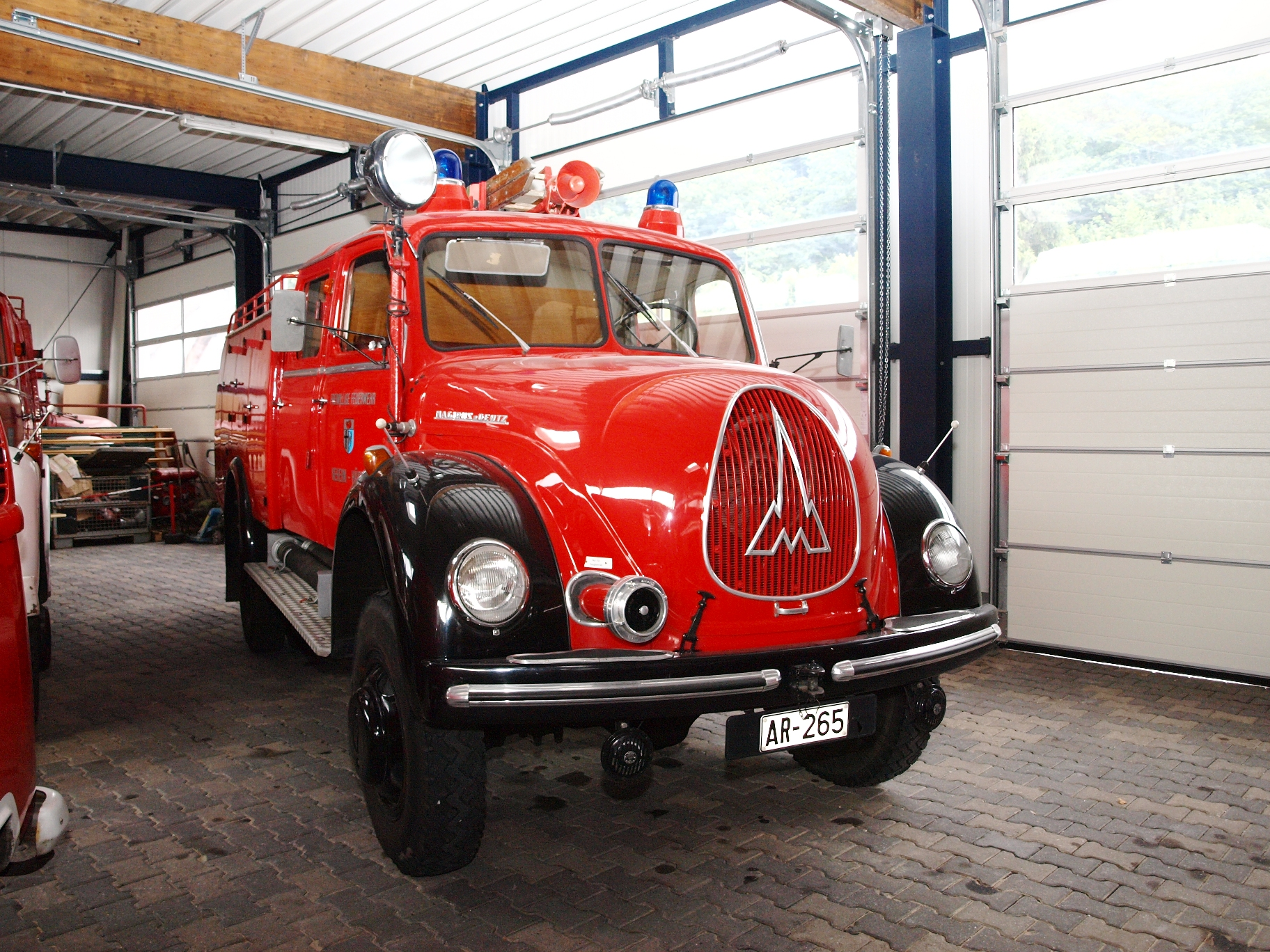 MAN Feuerwehrfahrzeug im Feuerwehrmuseum Arnsberg